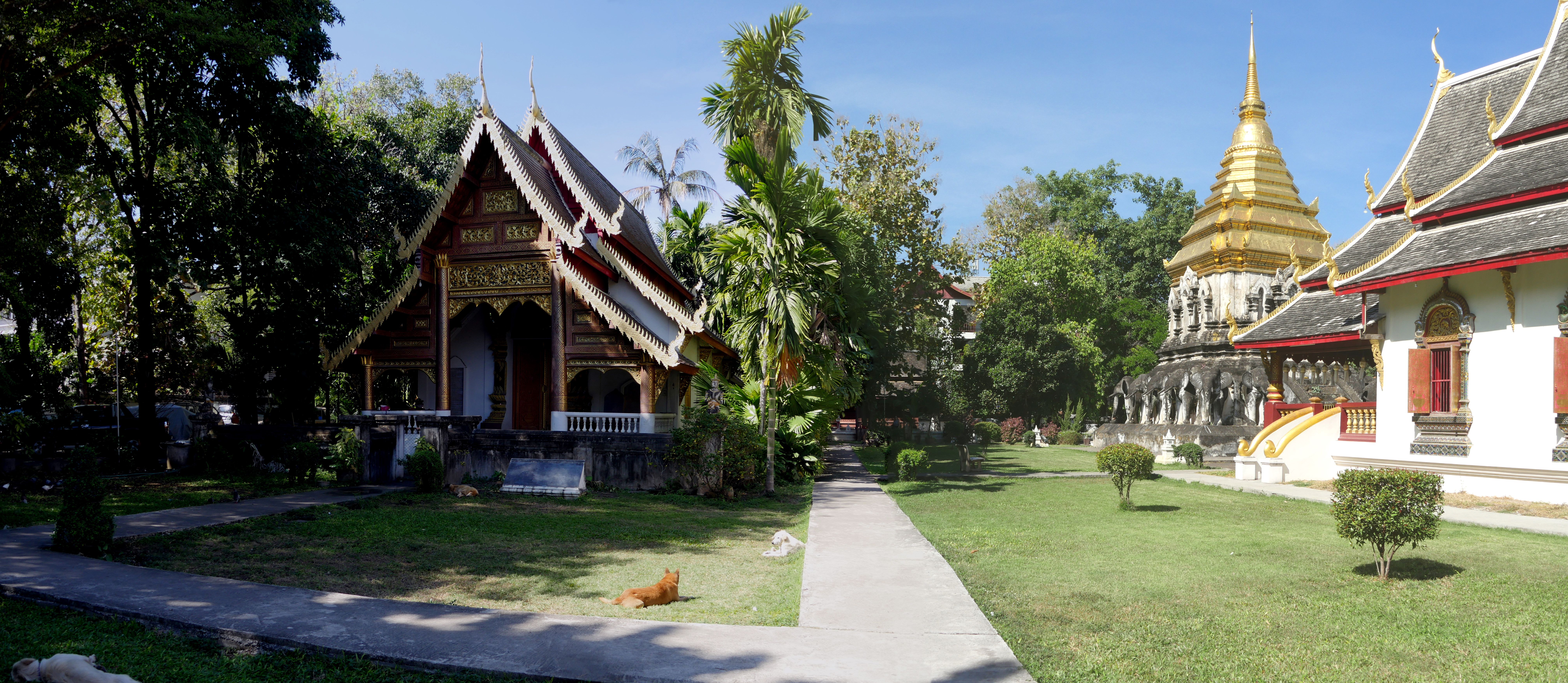 Ubosot (links) en Olifanten-Chedi (rechts) en een klein deel van het grote Wihan-gebouw (uiterst rechts). Achter de bomen is nog net iets van het Ho Trai-gebouw te zien, dat voorheen tussen Ubosot en Chedi stond.